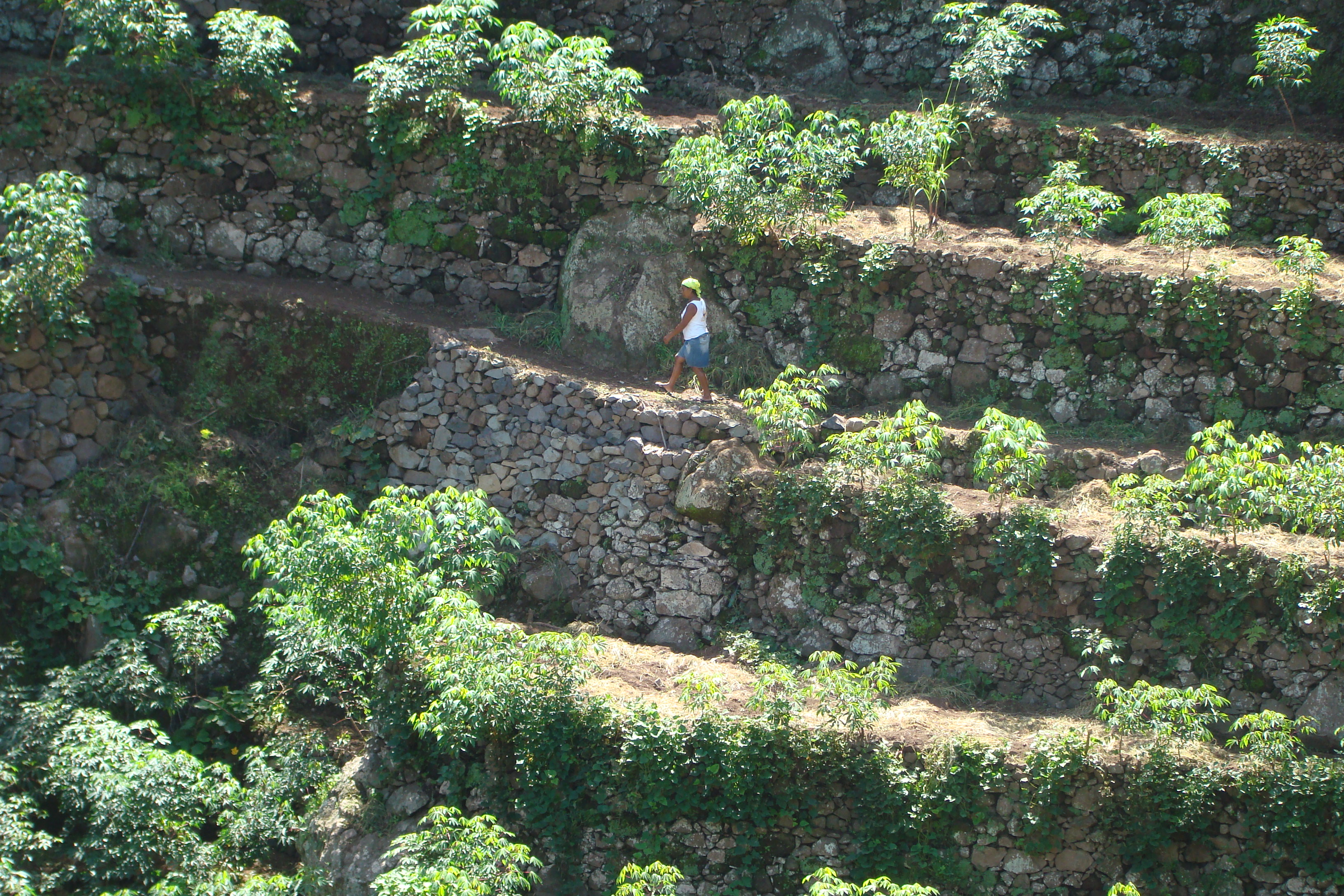 Bancales y Balates para cultivos en alta montaña en la Isla de Santo antao (Cabo Verde)